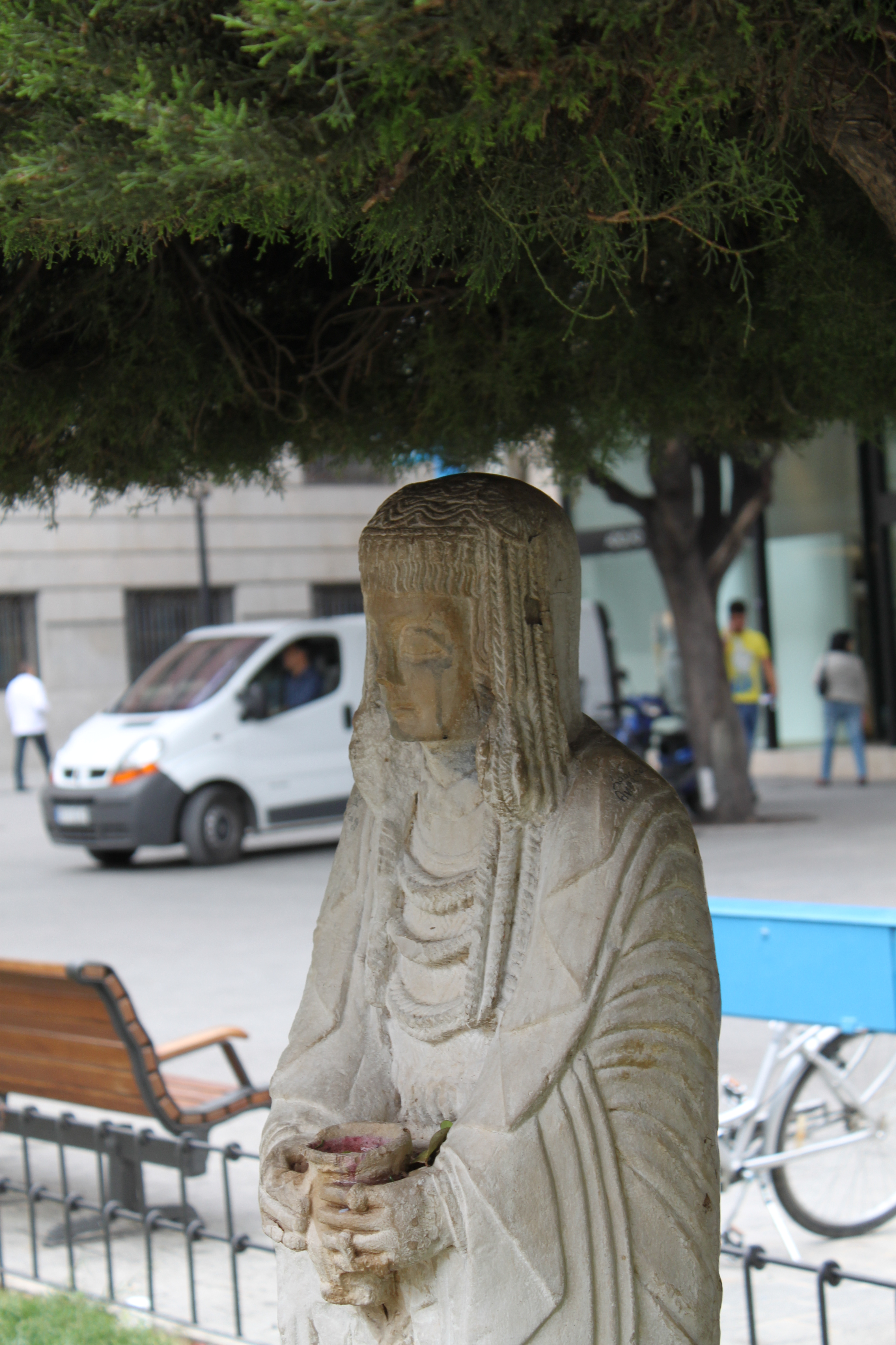 Dama Oferente del Parque del Altozano